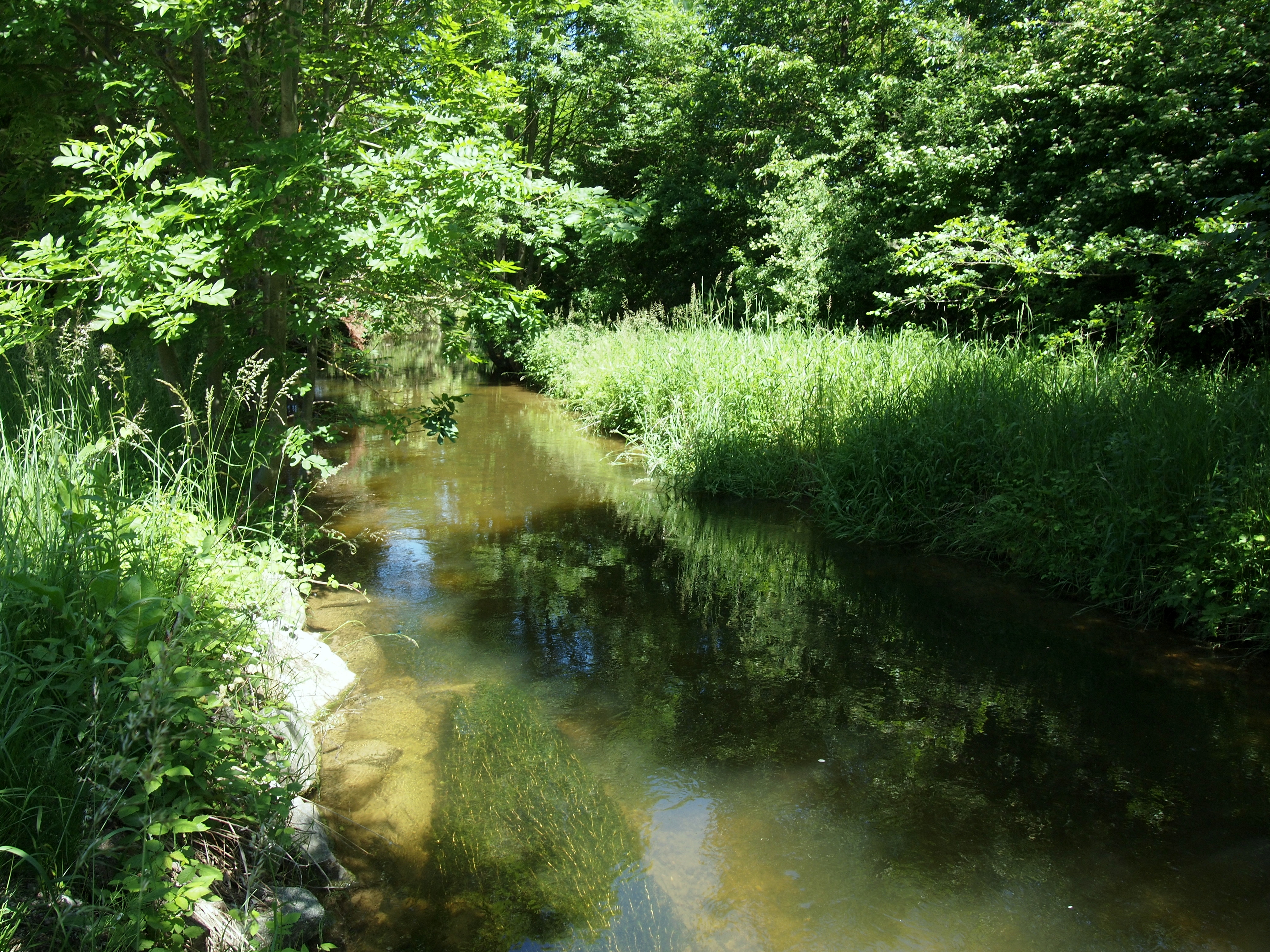 Mühlbach bei Ettringen